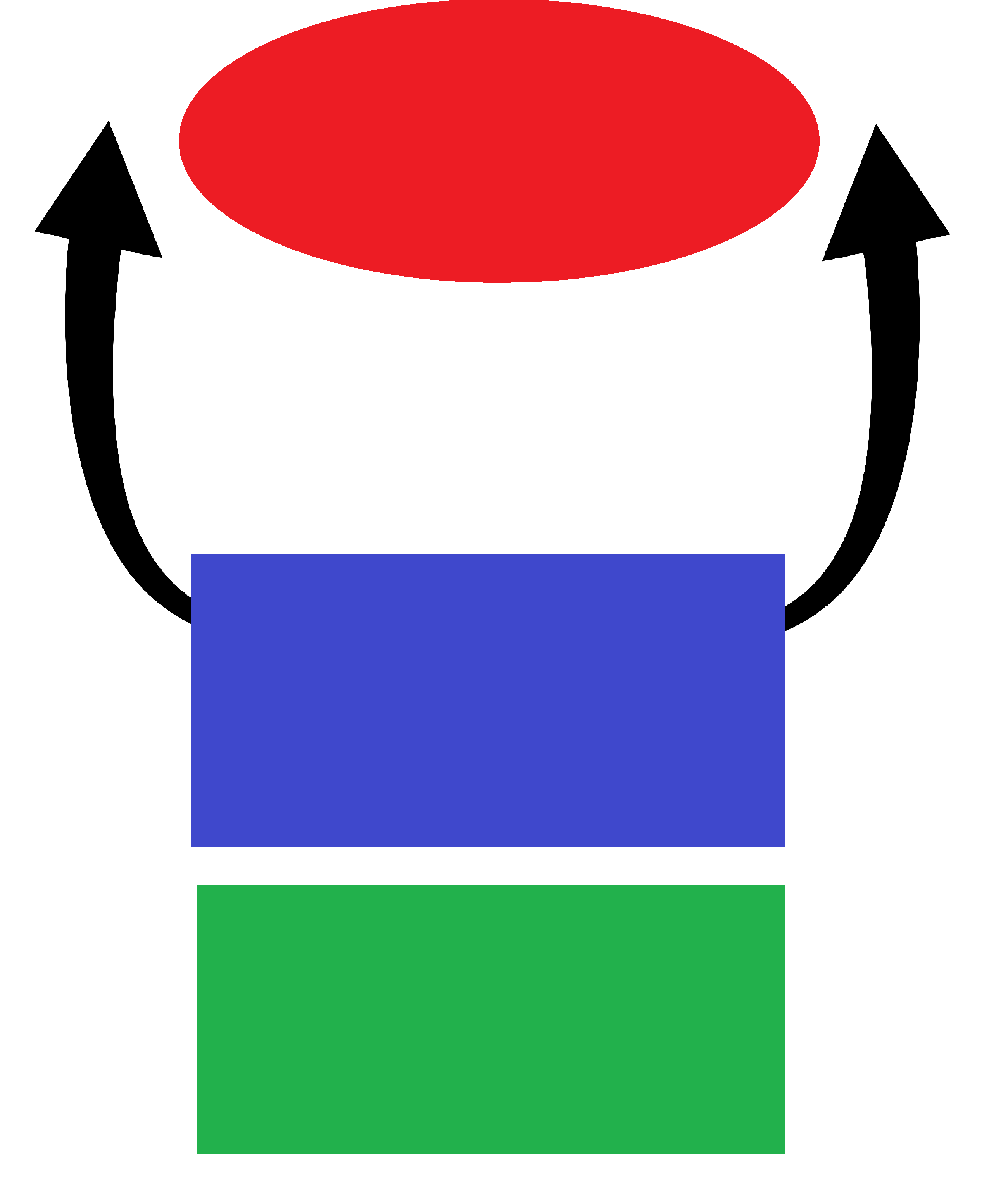 Prikaz taktike ( crne strelice - rogovi, plavi pravokutnik - prsa, zeleni pravokutnik - slabine, crvena elipsa - neprijatelj )